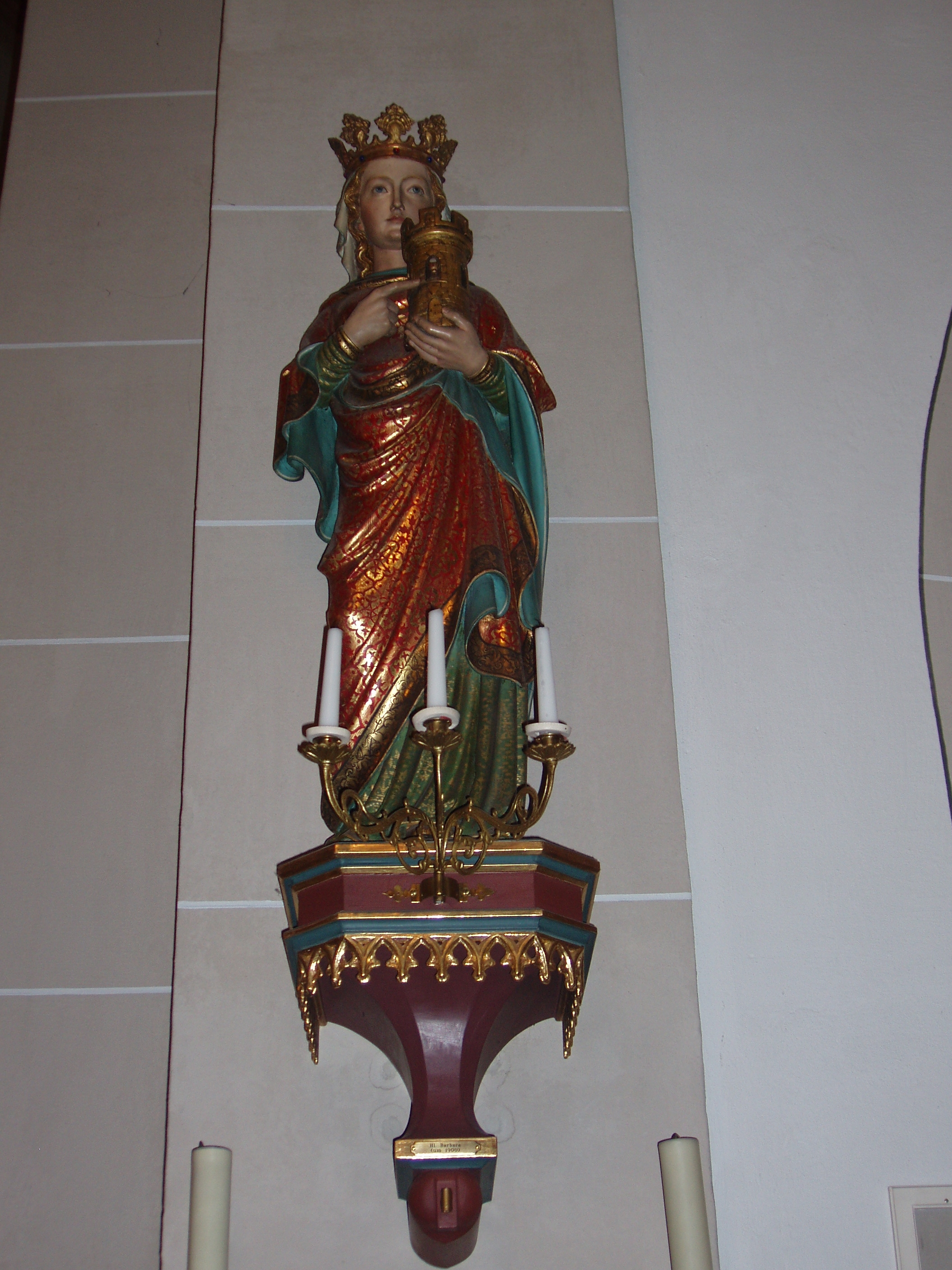 Barbara-Statue in der St.-Barbara-Kirche, rechts neben dem Altarbereich